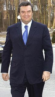 Viktor Yanukovych visits Russia